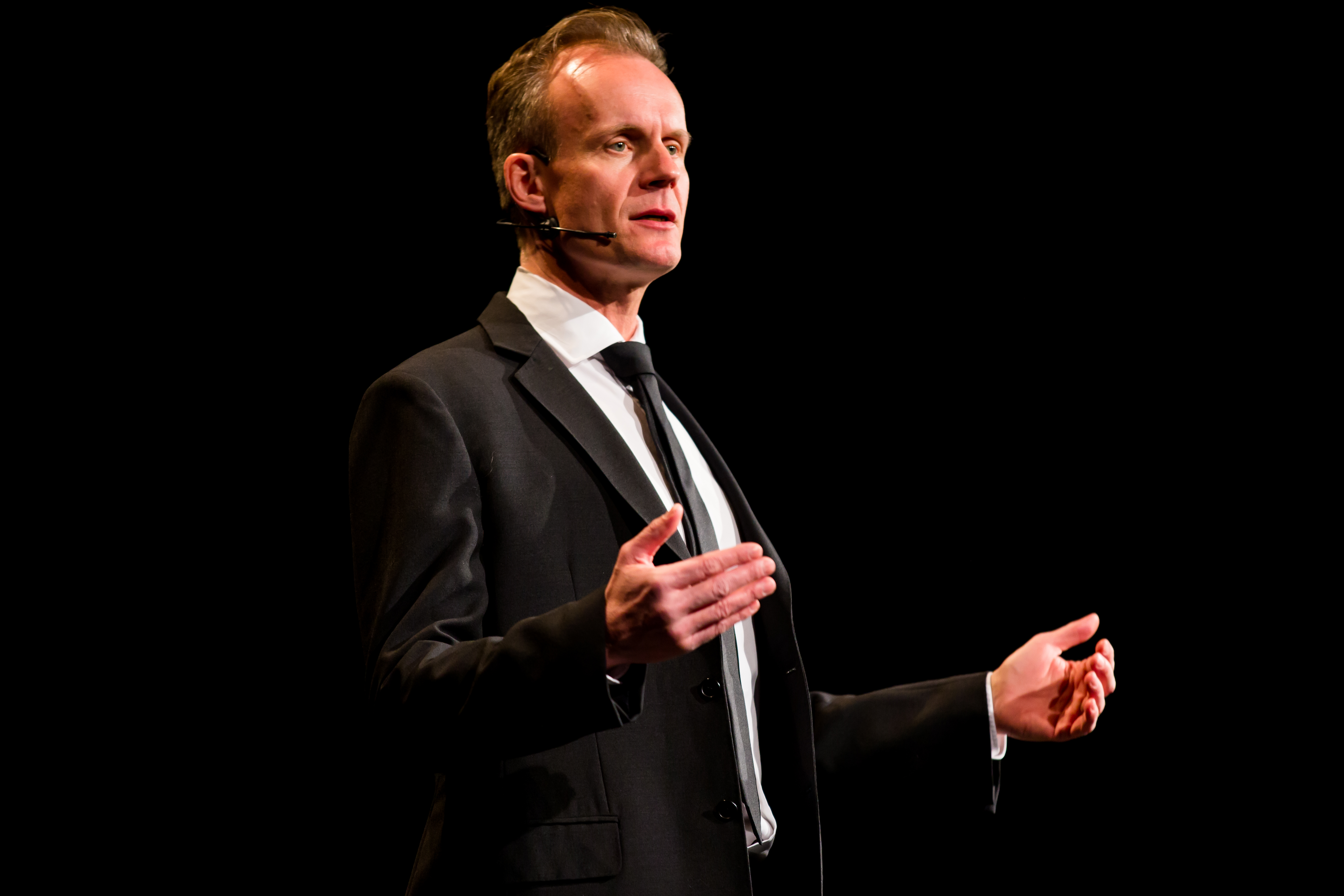 Max Uthoff, Gegendarstellung, Die KÄS (Frankfurt)